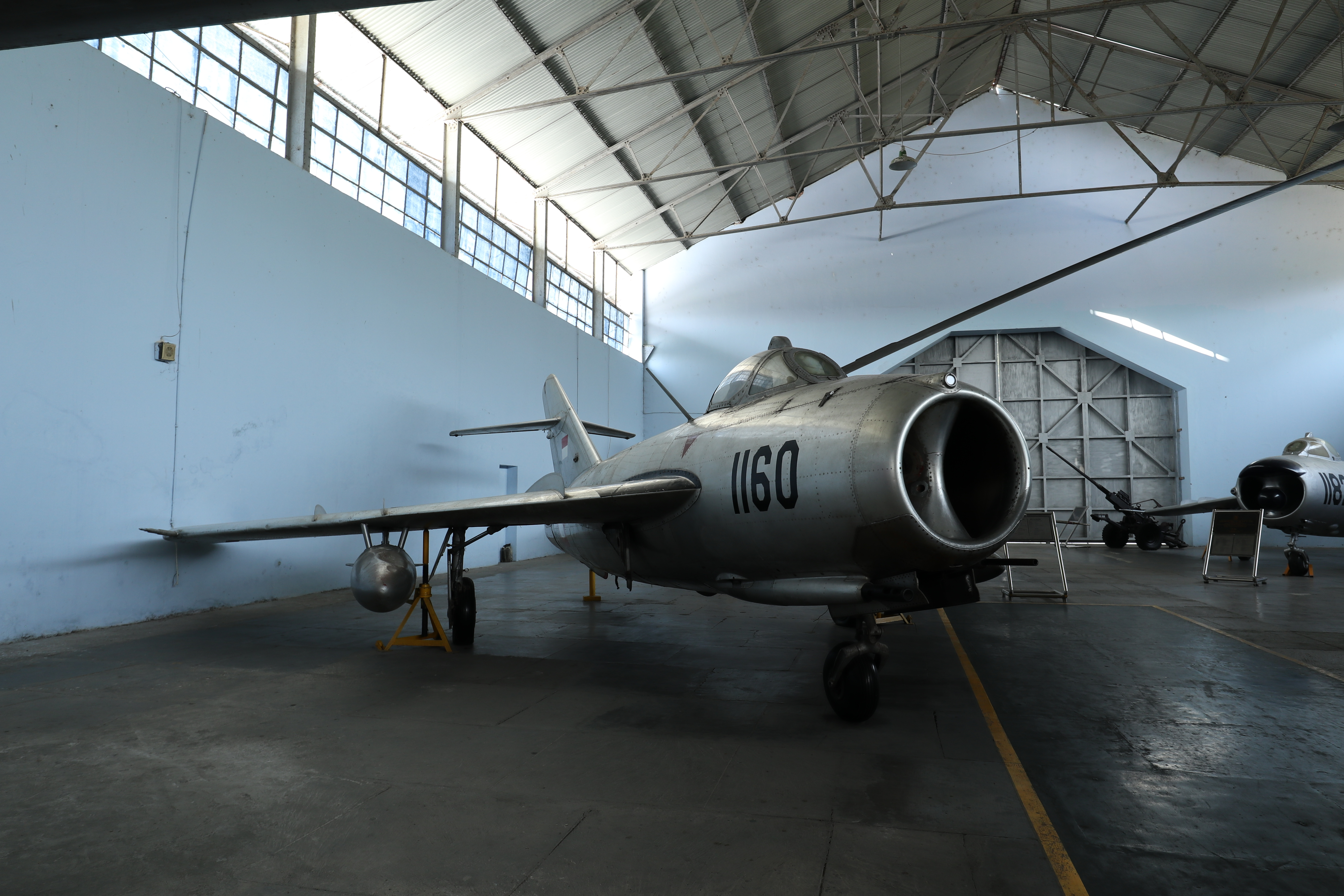 Pesawat MiG-17